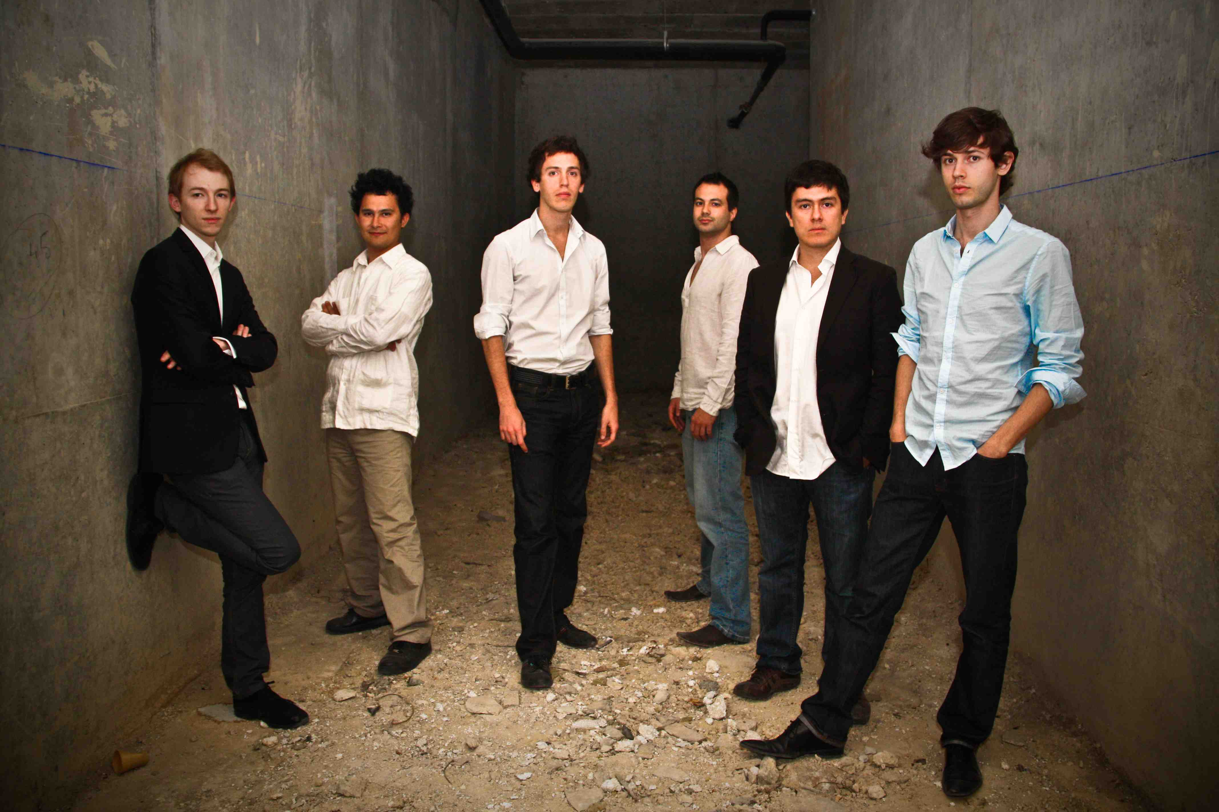 Membres fondateurs de l'ensemble musical « Le Balcon », créé en 2008 à Paris, France.